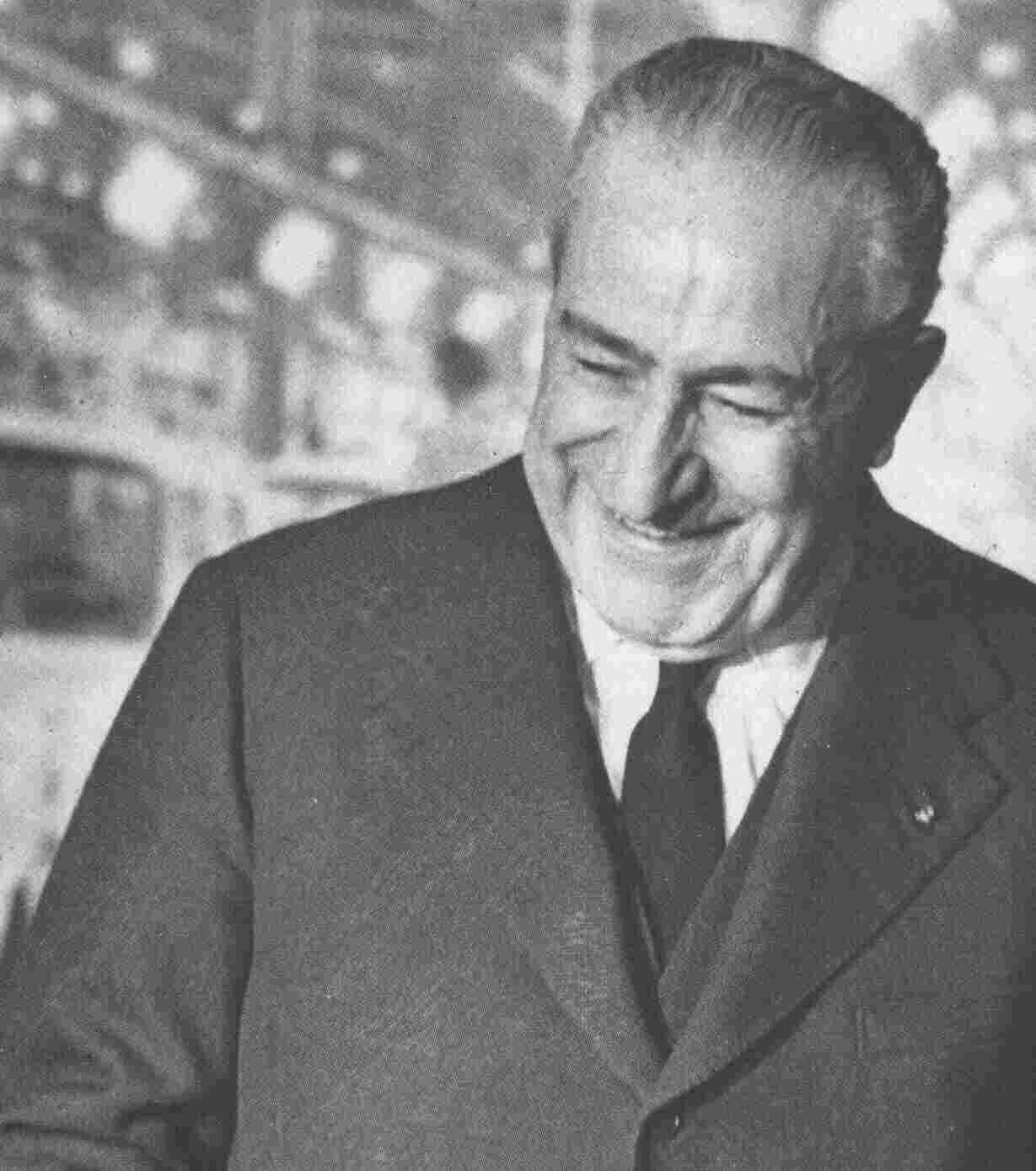 Enrico Teodoro Pigozzi, fondatore della Simca.